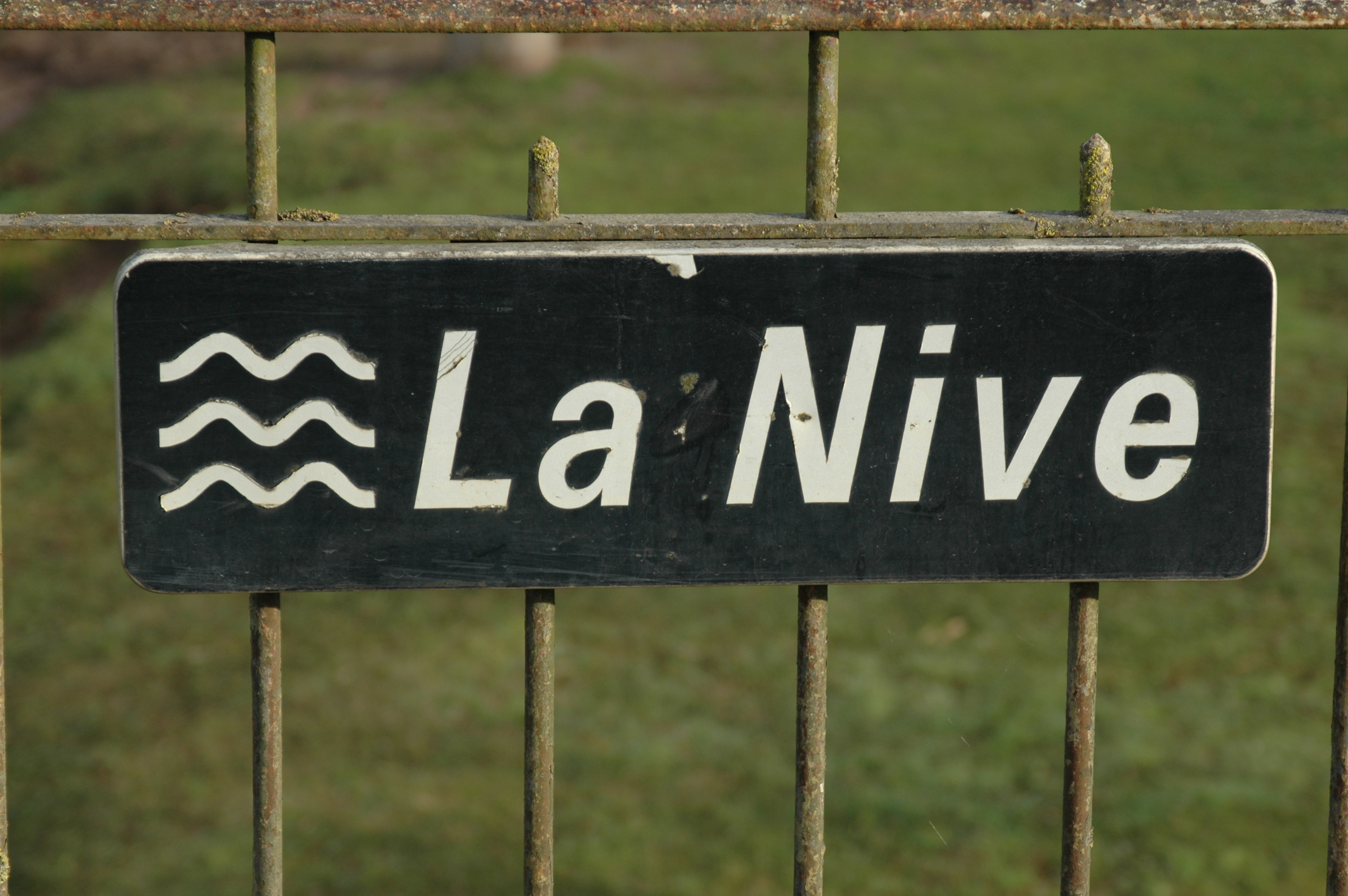 Ustaritz, panneau Nive. Photo prise le 31/12/06 par Harrieta171